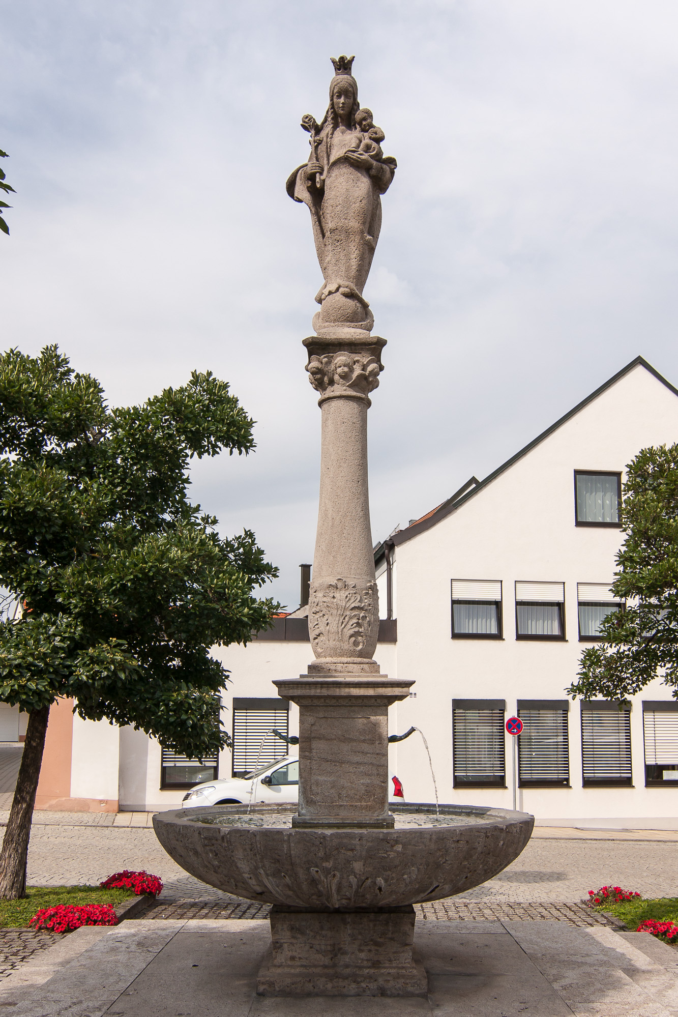 Mariensäule; 1949, an Stelle einer barocken Säule.This is a photograph of an architectural monument.